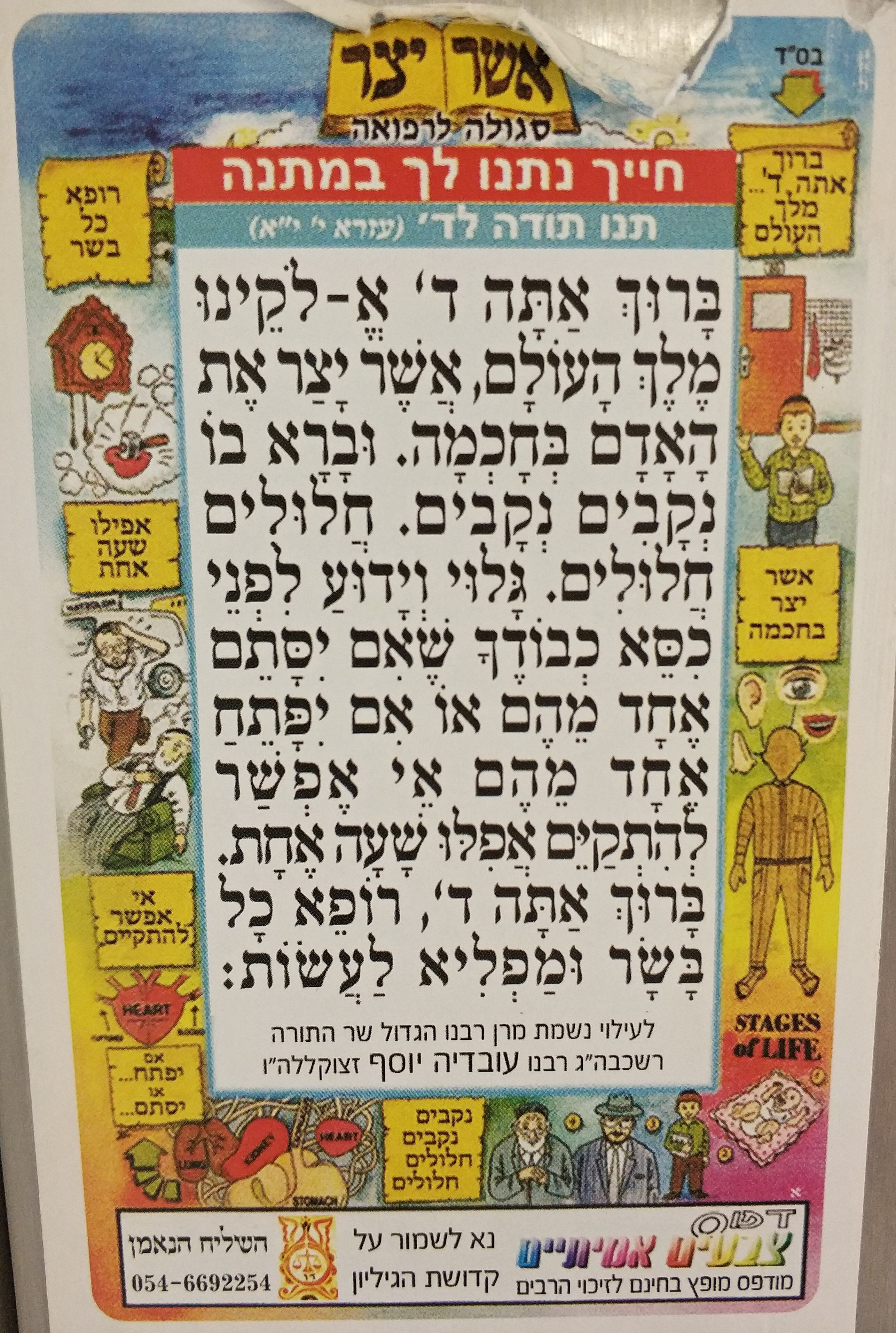 שלט ברכת אשר יצר המופץ חינם לזיכוי הרבים